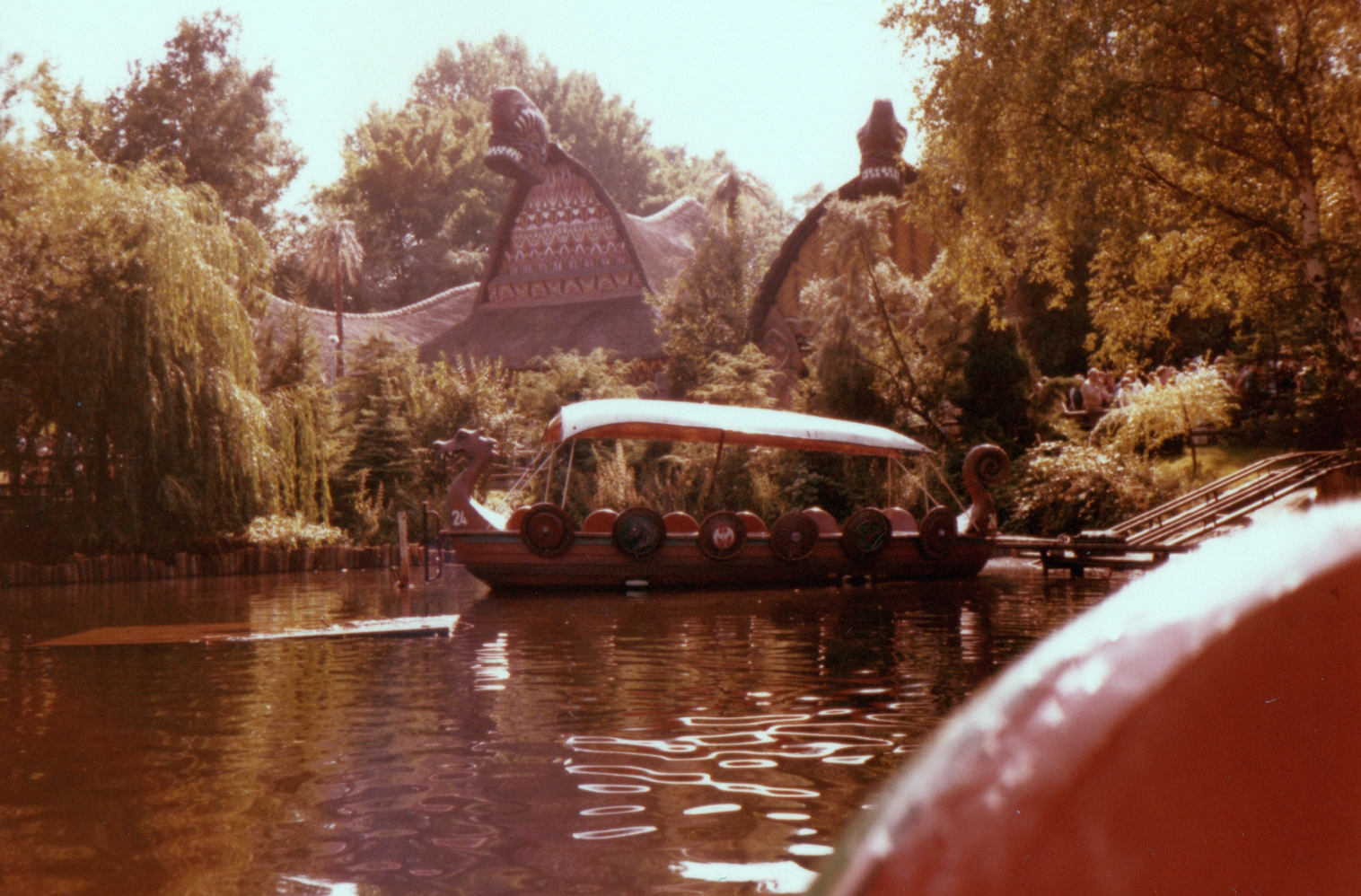 Phantasialand Wikinger Bootsfahrt, ehemals Piratenfahrt nach Cartagena, nach dem Segelschiff taucht ein Flusspferd auf